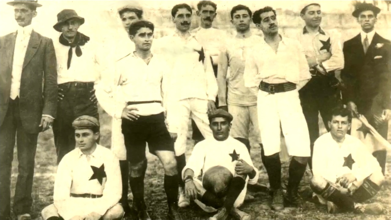 Stella Foot-Ball Club - década de 10